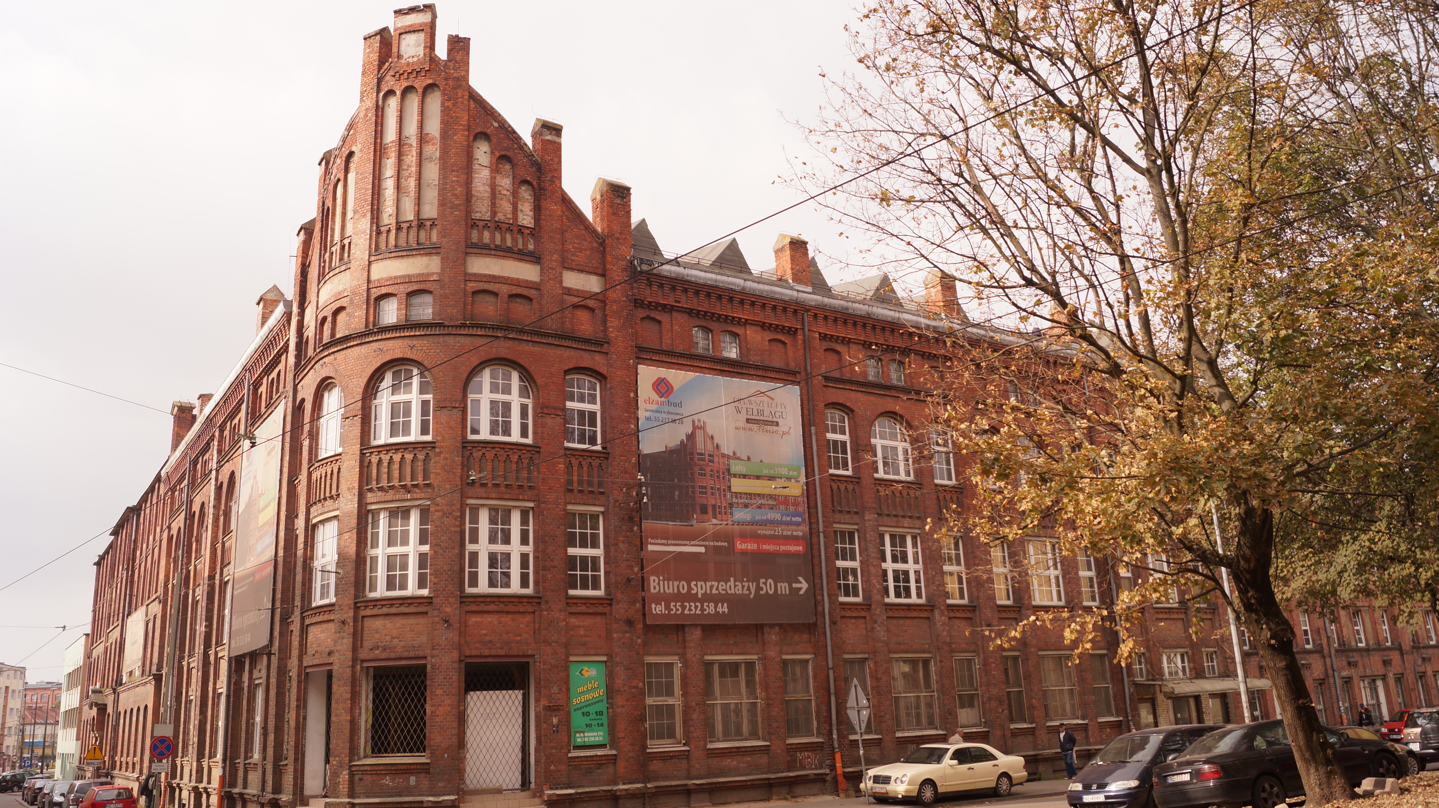 Elbląg, fabryka cygar Loeser und Wolff, ob. Zakłady Odzieżowy Truso